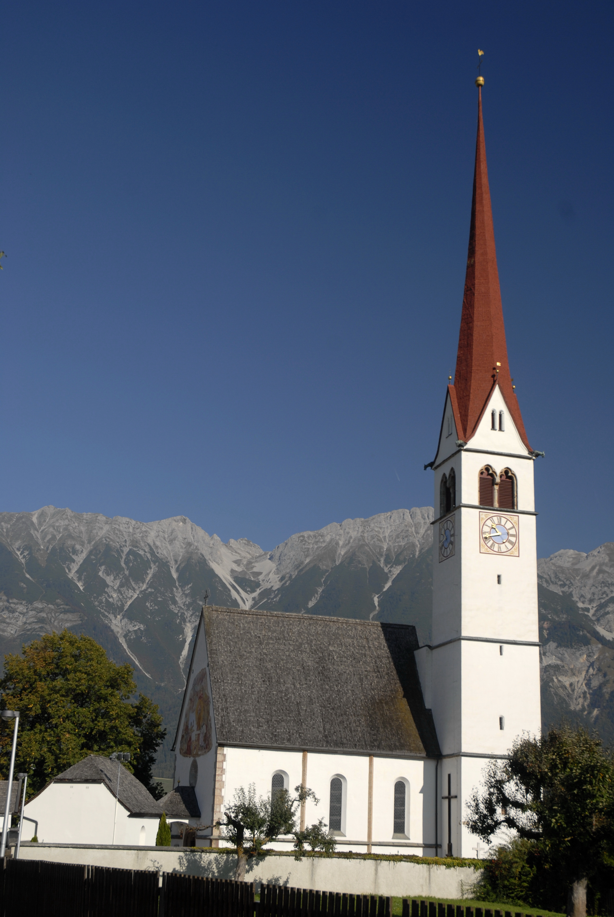 Innsbruck-Amras, Pfarrkirche Mariä Himmelfahrt